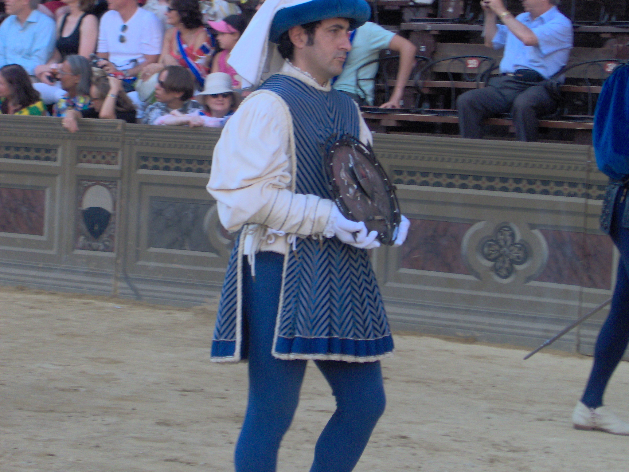 Image Palio dell'Assunta (16/08/2006) - Siena